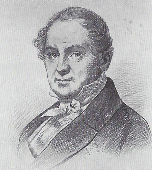 Lithographie von Eduard Heinrich von Flottwell (1786-1865)